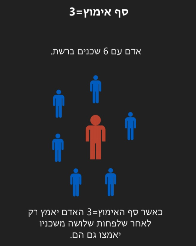 סף